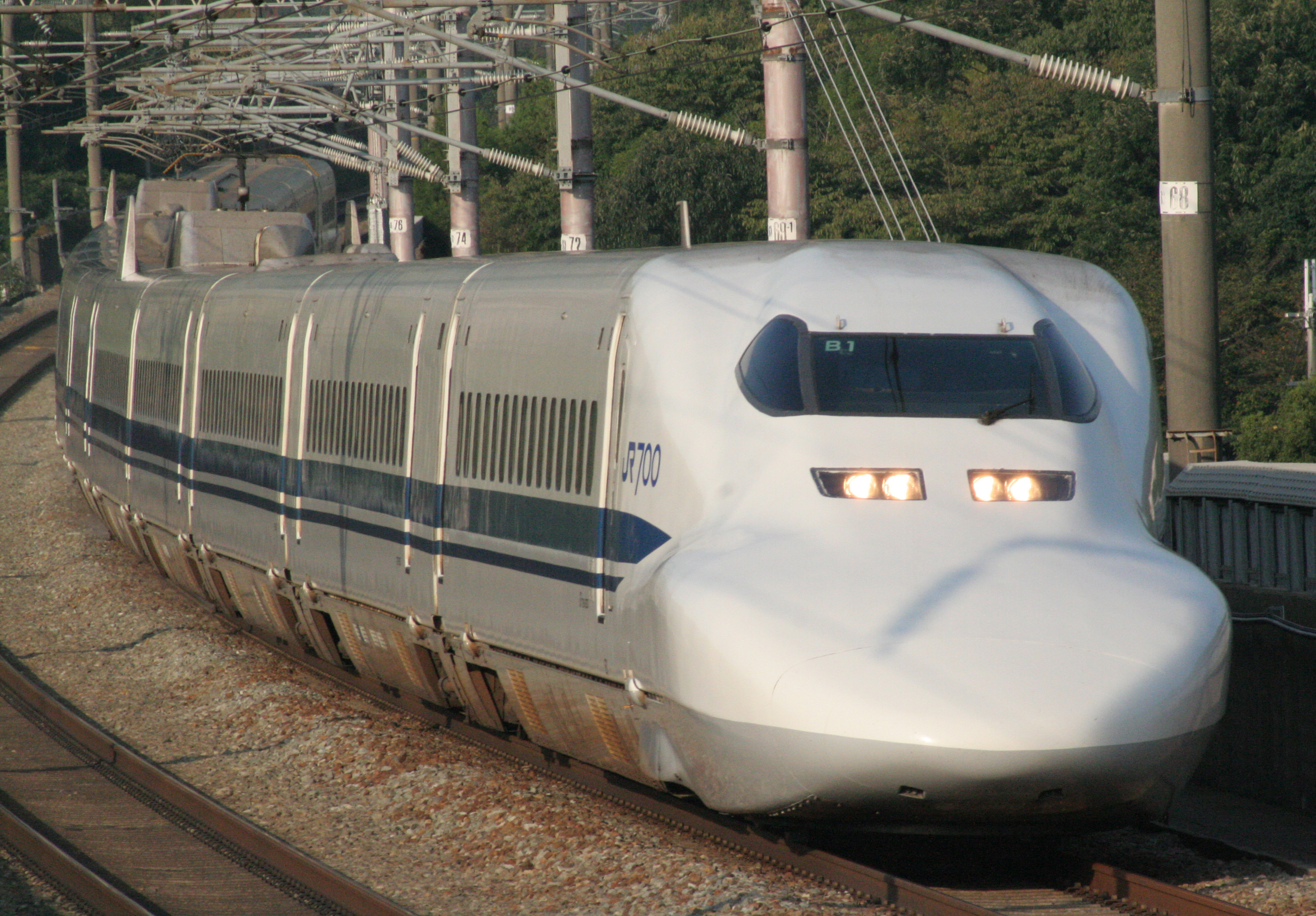 JR西日本 新幹線700系電車3000番台 B1編成 山陽新幹線、岡山-相生間（兵庫県赤穂市の大津トンネル西坑付近） のぞみ72号（広島-東京）